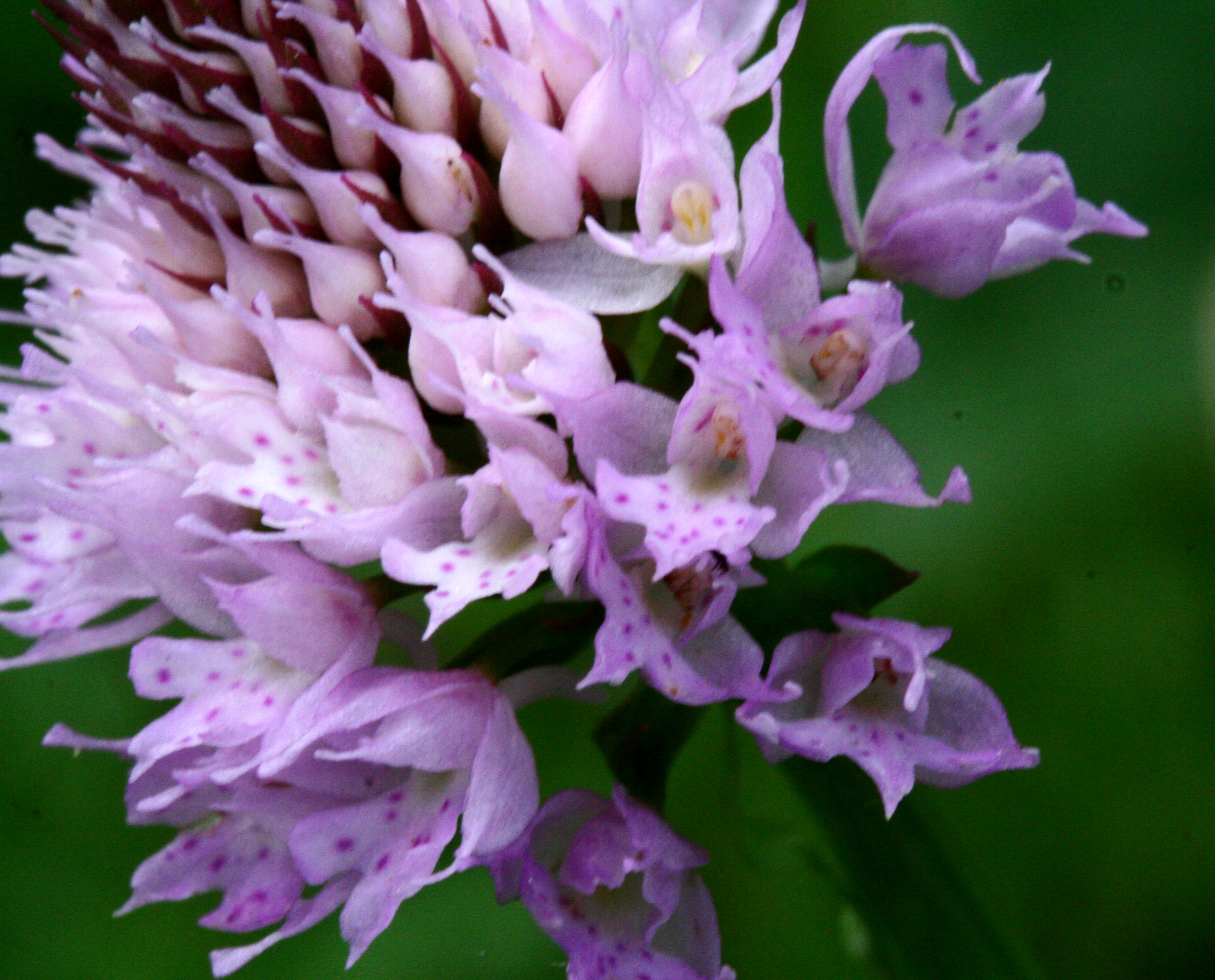 Orchide dei pascoli - Località: "Giardino Botanico delle Alpi Orientali", Monte Faverghera (BL), 1500 m s.l.m.